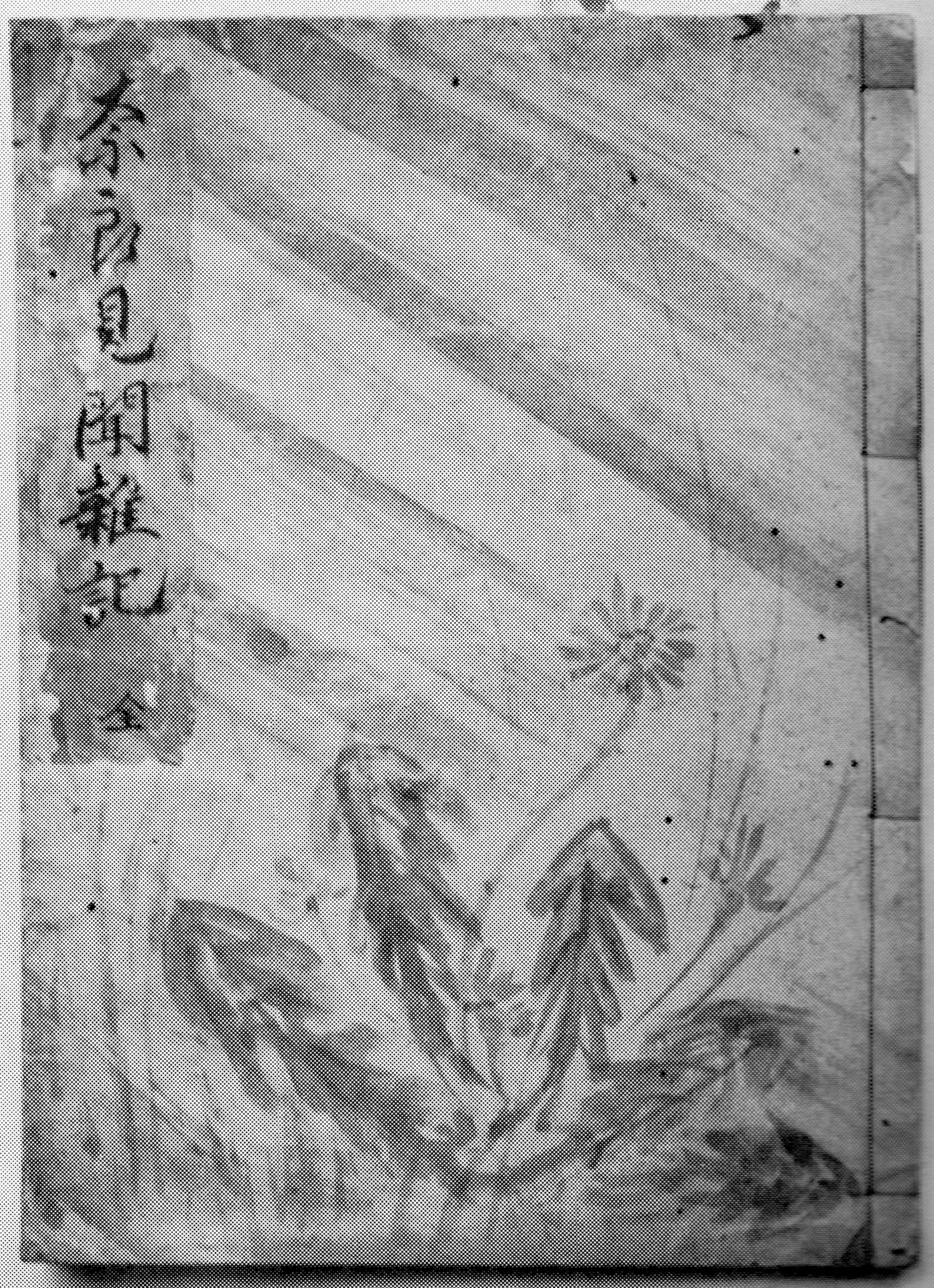 奈良見聞雑記 村井古道著 表紙